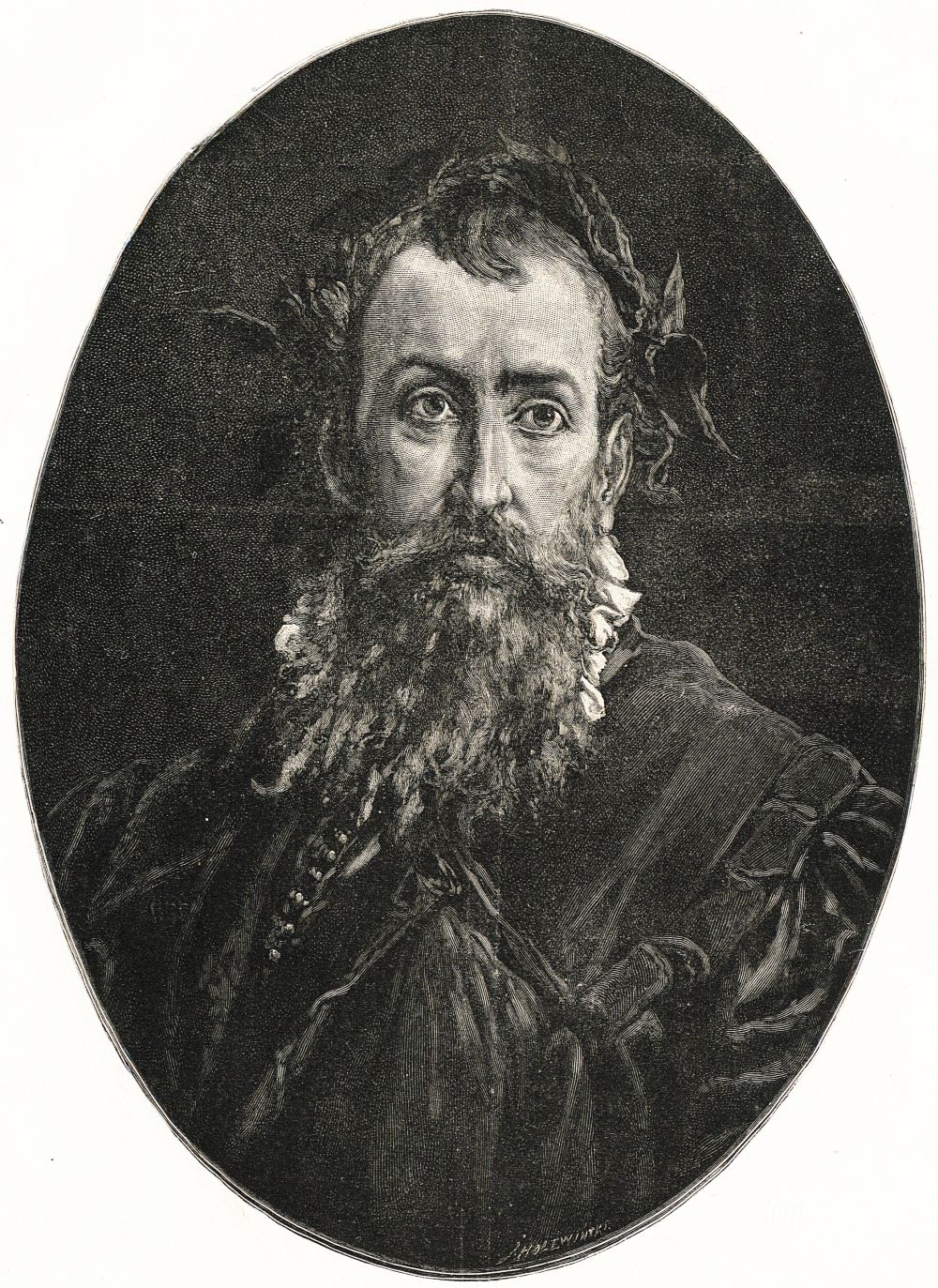 Portret Jana Kochanowskiego